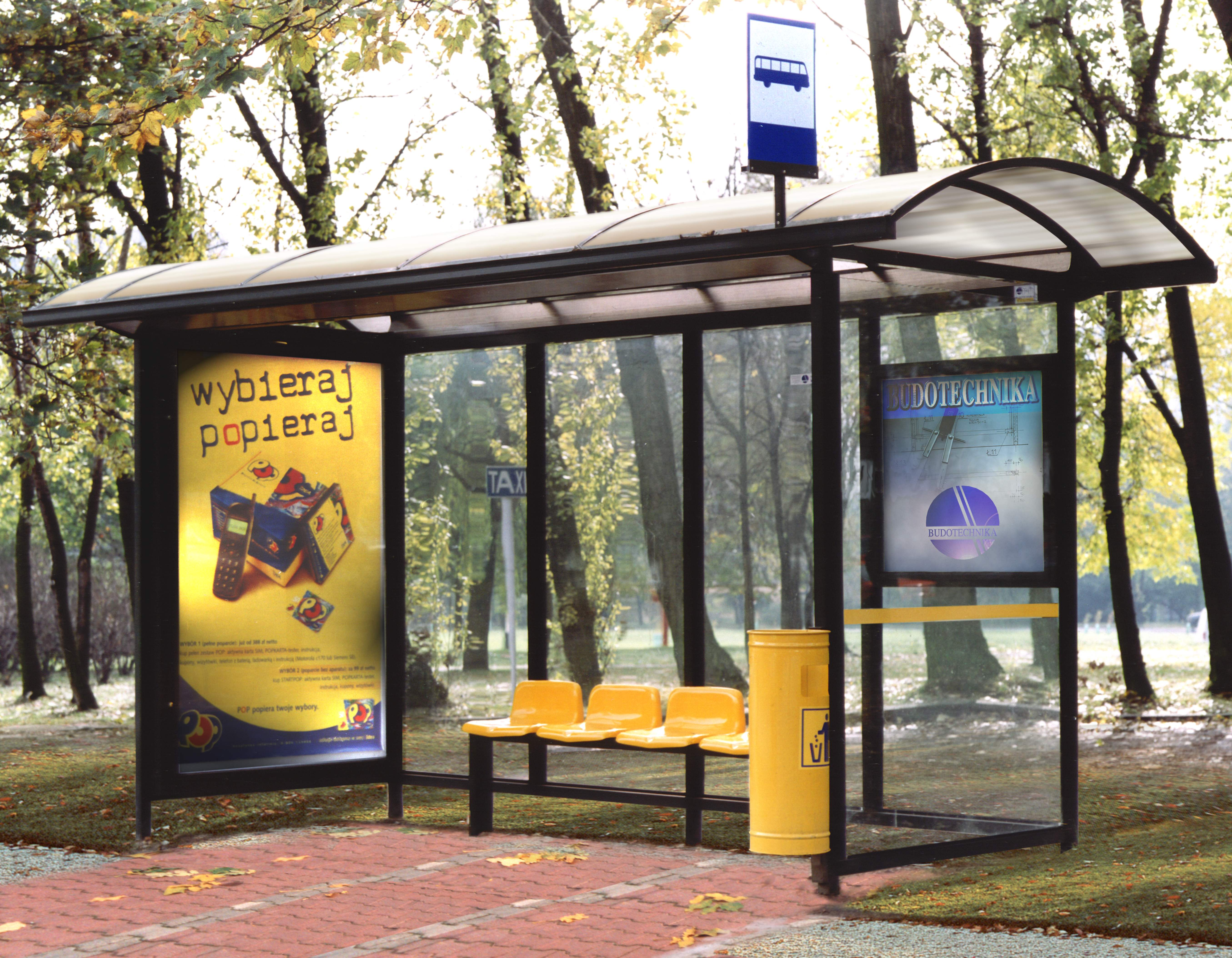 Merkury z Gablotą Reklamową Gablotką Info Fotelikami z Laminatu Koszem na Śmieci Znakiem Przystanku na Wysięgniku